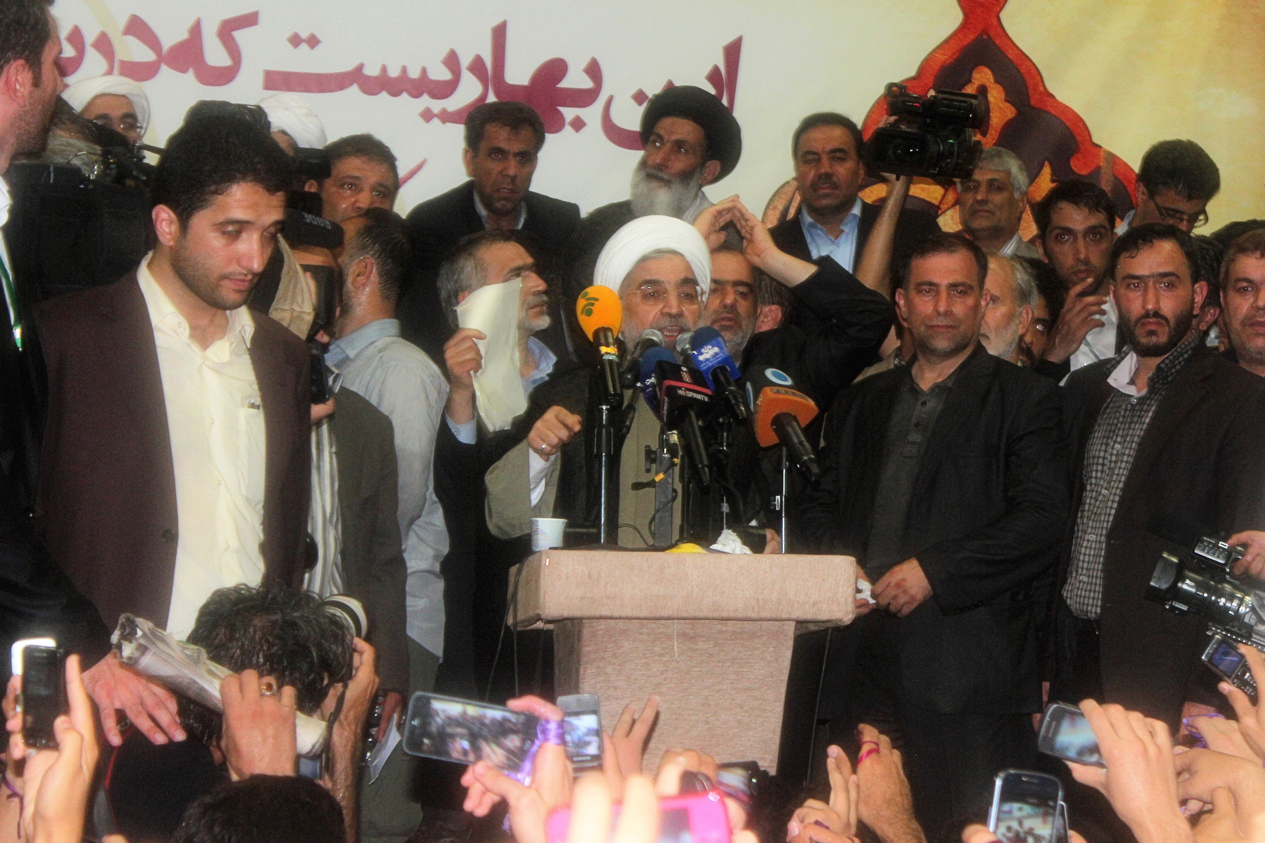 دکتر حسن روحانی در سفر انتخاباتی مشهد تاریخ ۲۲ خرداد ۱۳۹۲